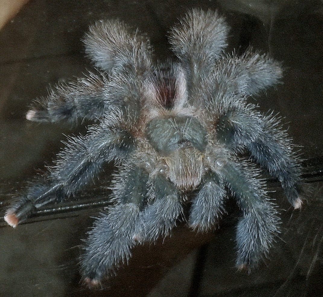 Avicularia Braunshauseni (caranguejeira)